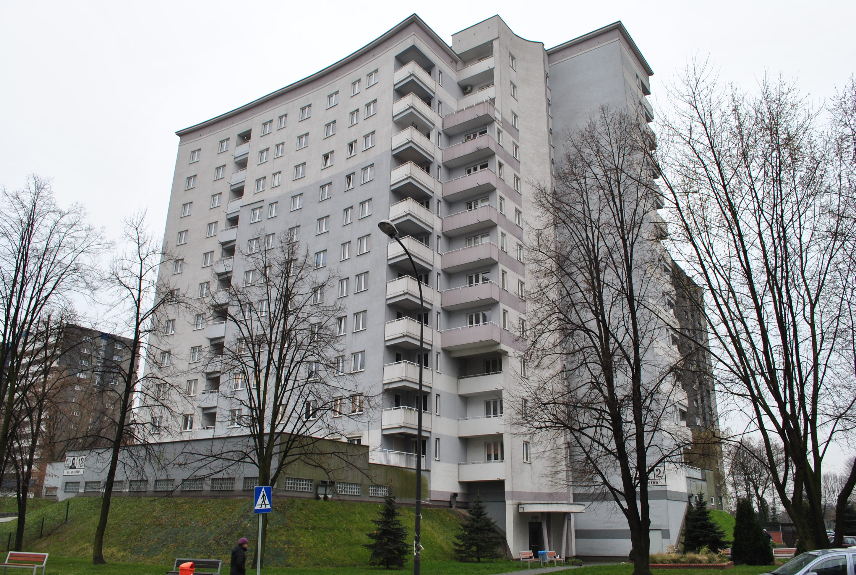 Katowice, Osiedle Tysiąclecia. Budynek mieszkalny przy ul. Piastów